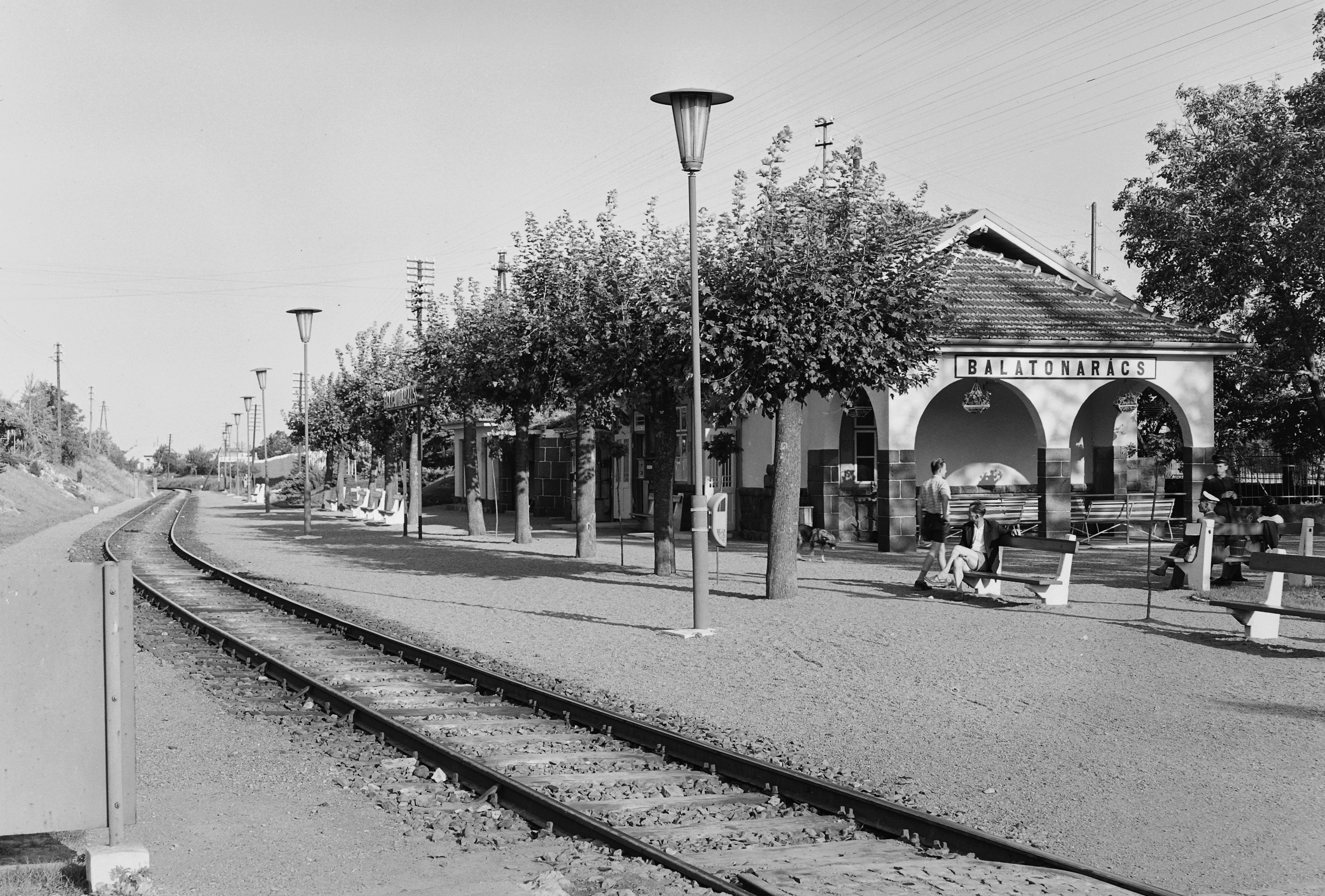 vasútállomás. Location: Hungary, Balatonarács Tags: railway, lamp post, street furniture, train station Title: vasútállomás.